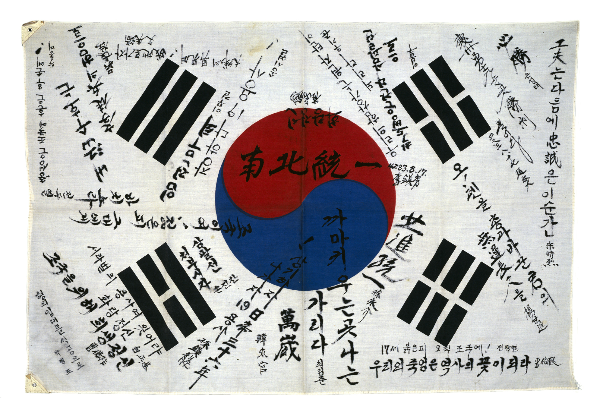 경주 학도병 서명문 태극기(慶州 學徒兵 書名文 太極旗)-등록문화재 제391호 자료제공 : 독립기념관 한국전쟁 당시 경주에서 자원한 19명의 학도병이 전쟁에 나아가기 전에 각자의 소감을 적은 태극기로, 학도병의 굳은 의지와 각오가 담겨져 있다.